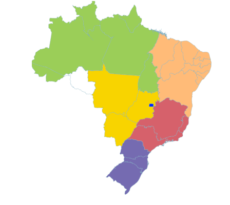 Distribuição geográfica de Salviniaceae